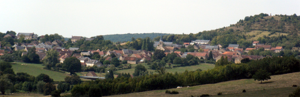 Le village en contrebas du Montgué